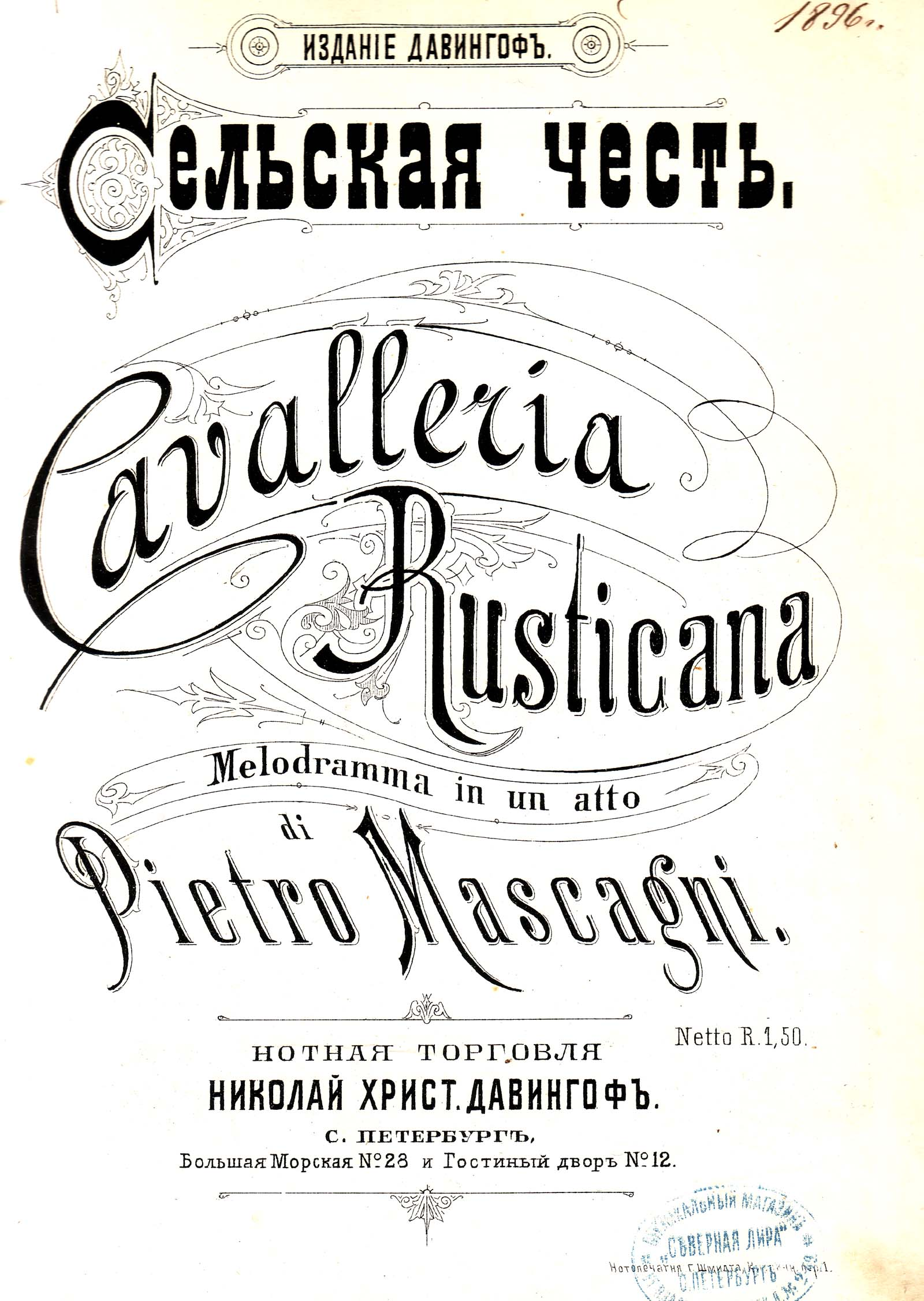 Frontespizio in cirillico del libretto della Cavalleria rusticana di Mascagni